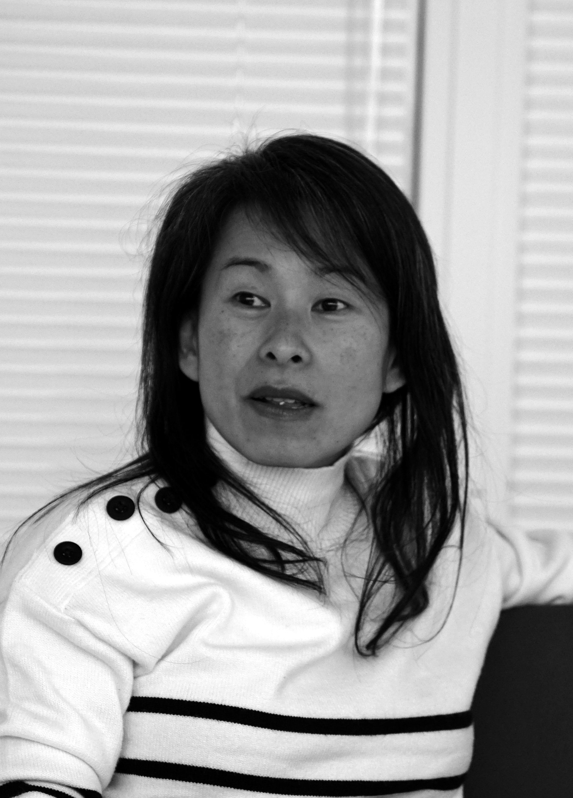 présente à la bibliothèque Robert de Sorbon.